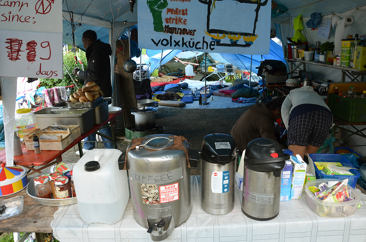 Am 24. Mai 2014 schlugen Flüchtlinge aus dem Sudan ihre Zelte auf dem Weißekreuzplatz in Hannover auf, um öffentlich sichtbar friedlich gegen ihre Abschiebung zu protestieren ...